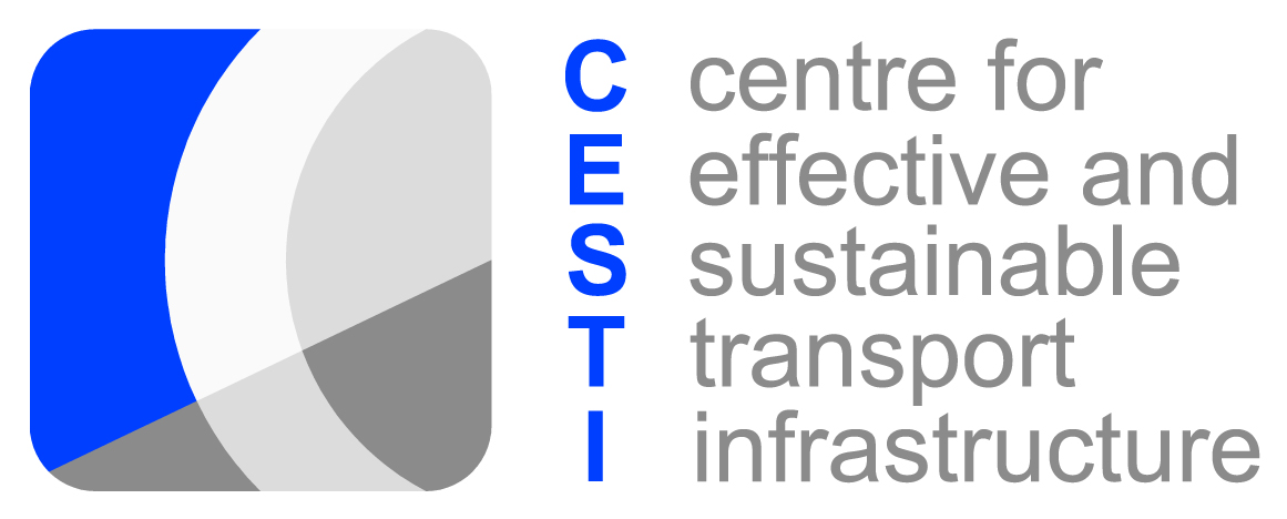 Logo projektu CESTI